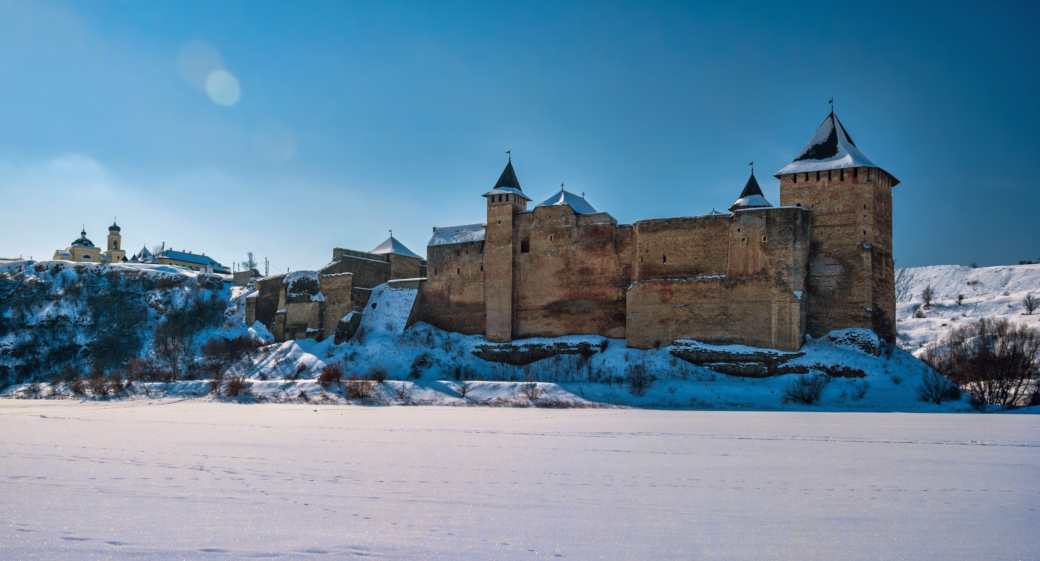 Комплекс споруд фортеці (Державний історико-архітектурний заповідник «Хотинська фортеця»), Хотин, вул. Фортечна